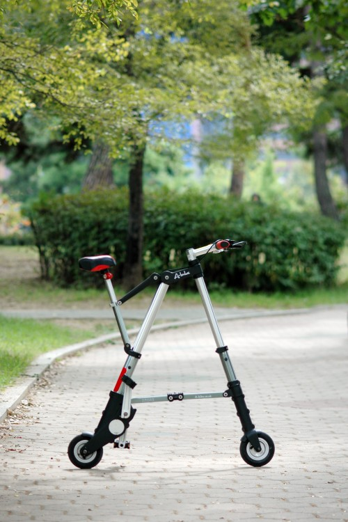 A-bike stand alone